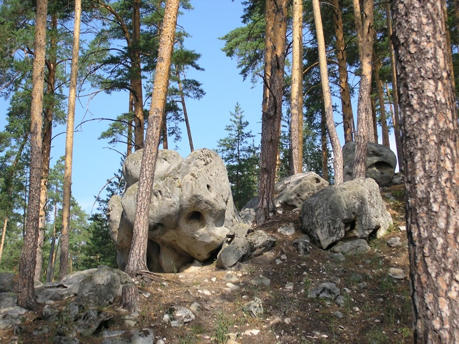 Валуны песчаника на территории памятника природы "Малоусинские нагорные сосняки и дубравы".